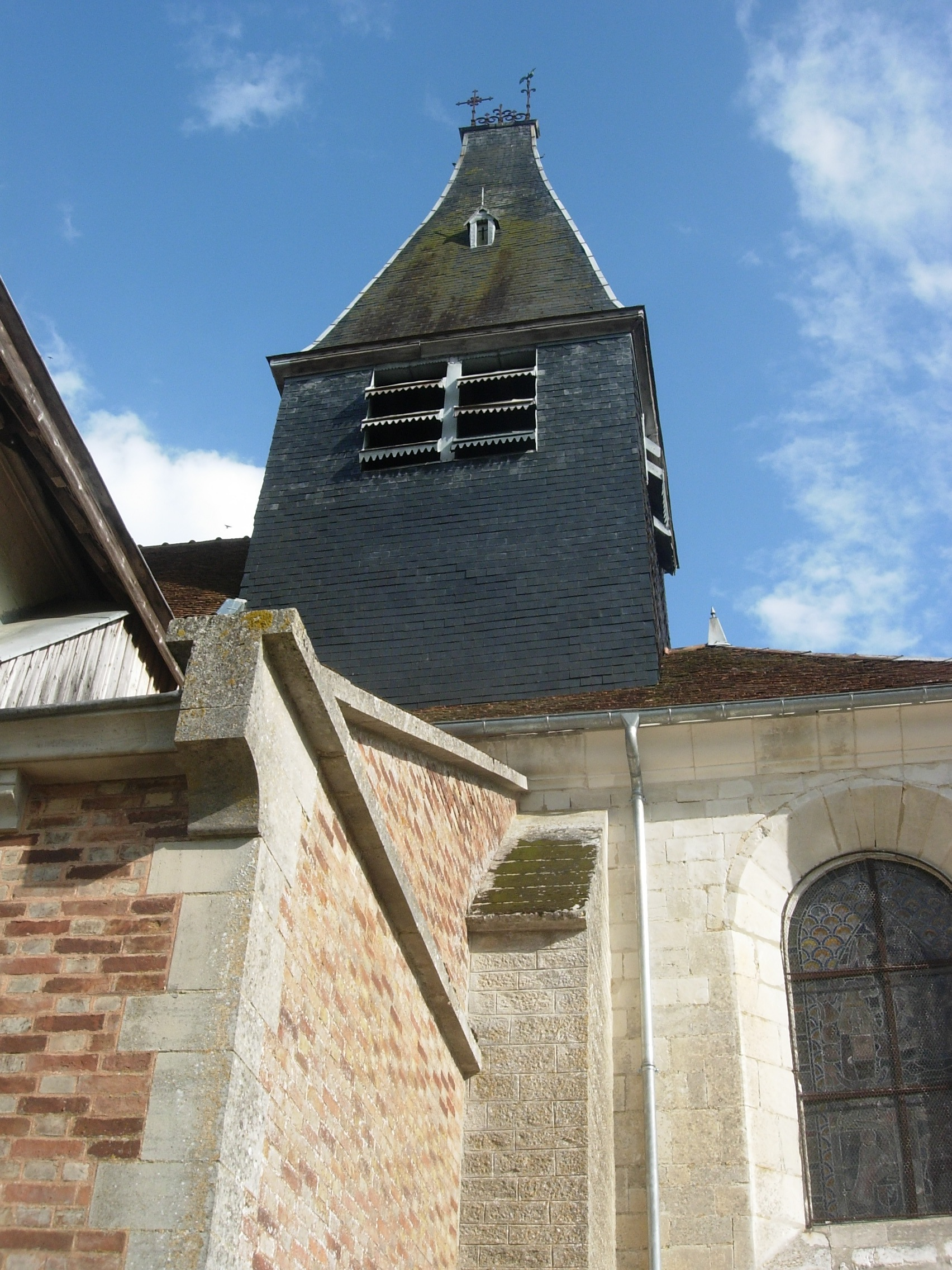 Eglise de Rances (Aube)